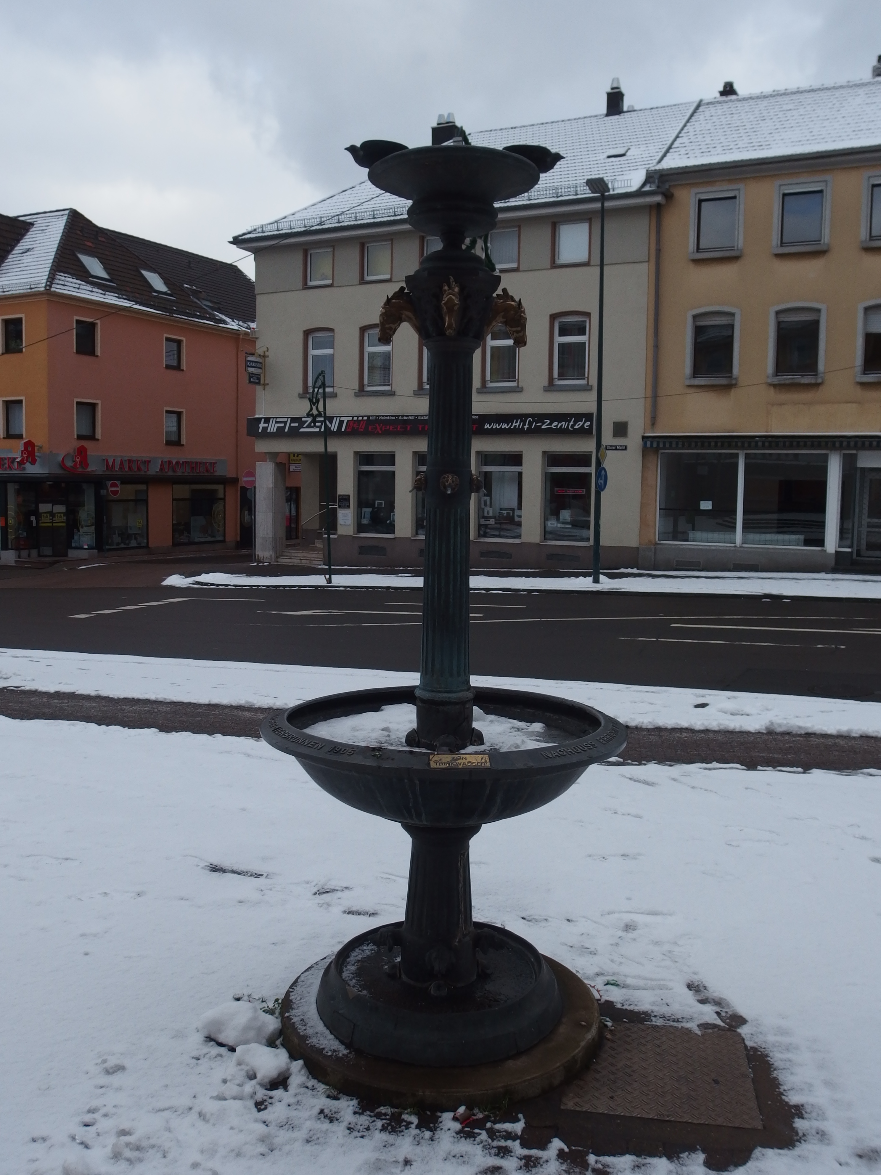 Replik des Karcher Tierbrunnen am Oberen Markt in Neunkirchen (Saar)